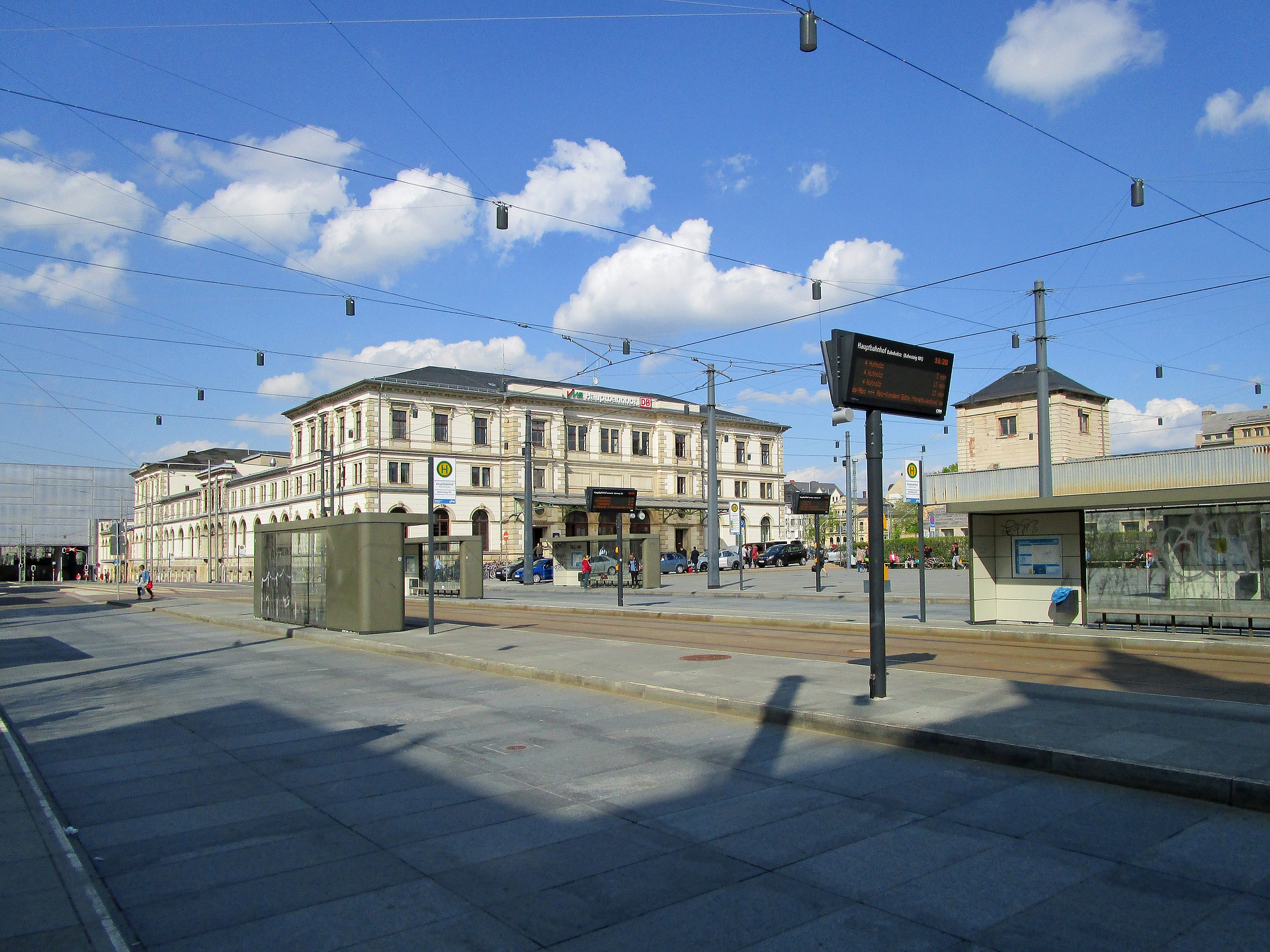 Das Empfangsgebäude des Hauptbahnhofes Chemnitz am Bahnhofsvorplatz am 30.04.2015.